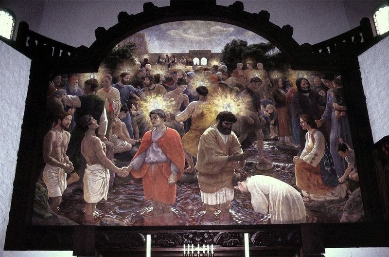 Immanuelskirken i Danmark. Altertavle